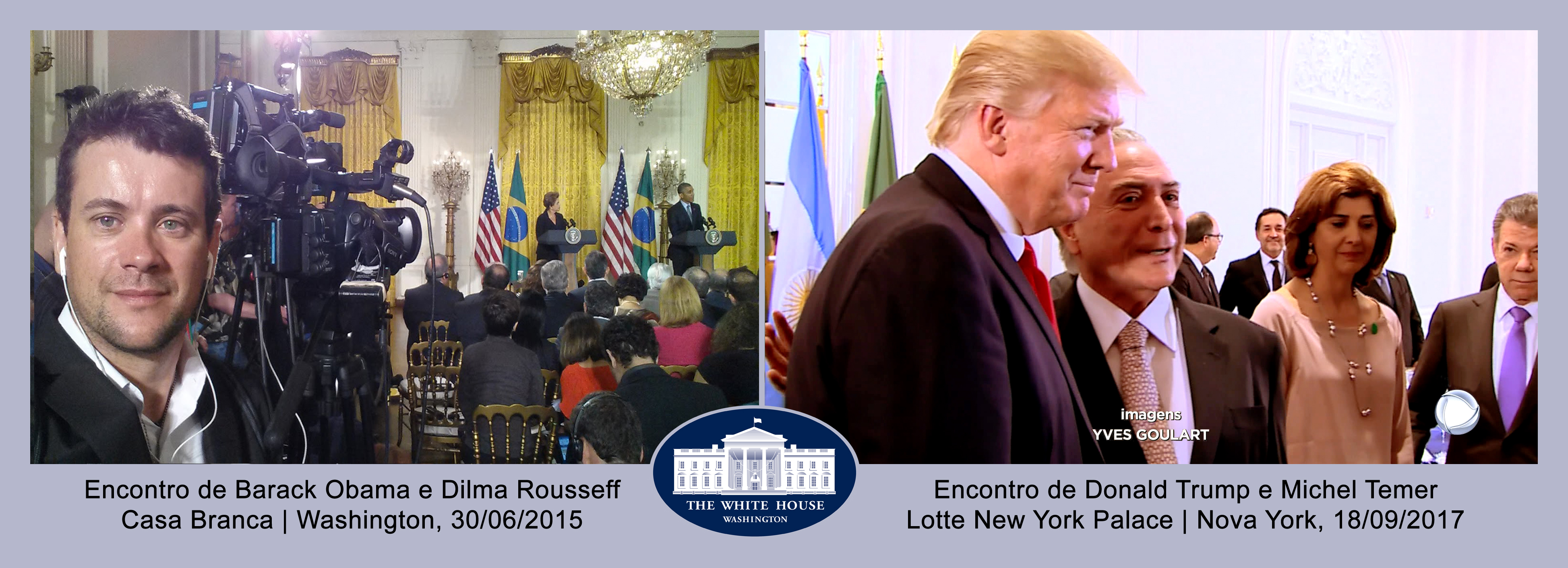 Yves Goulart - Repórter Cinematográfico